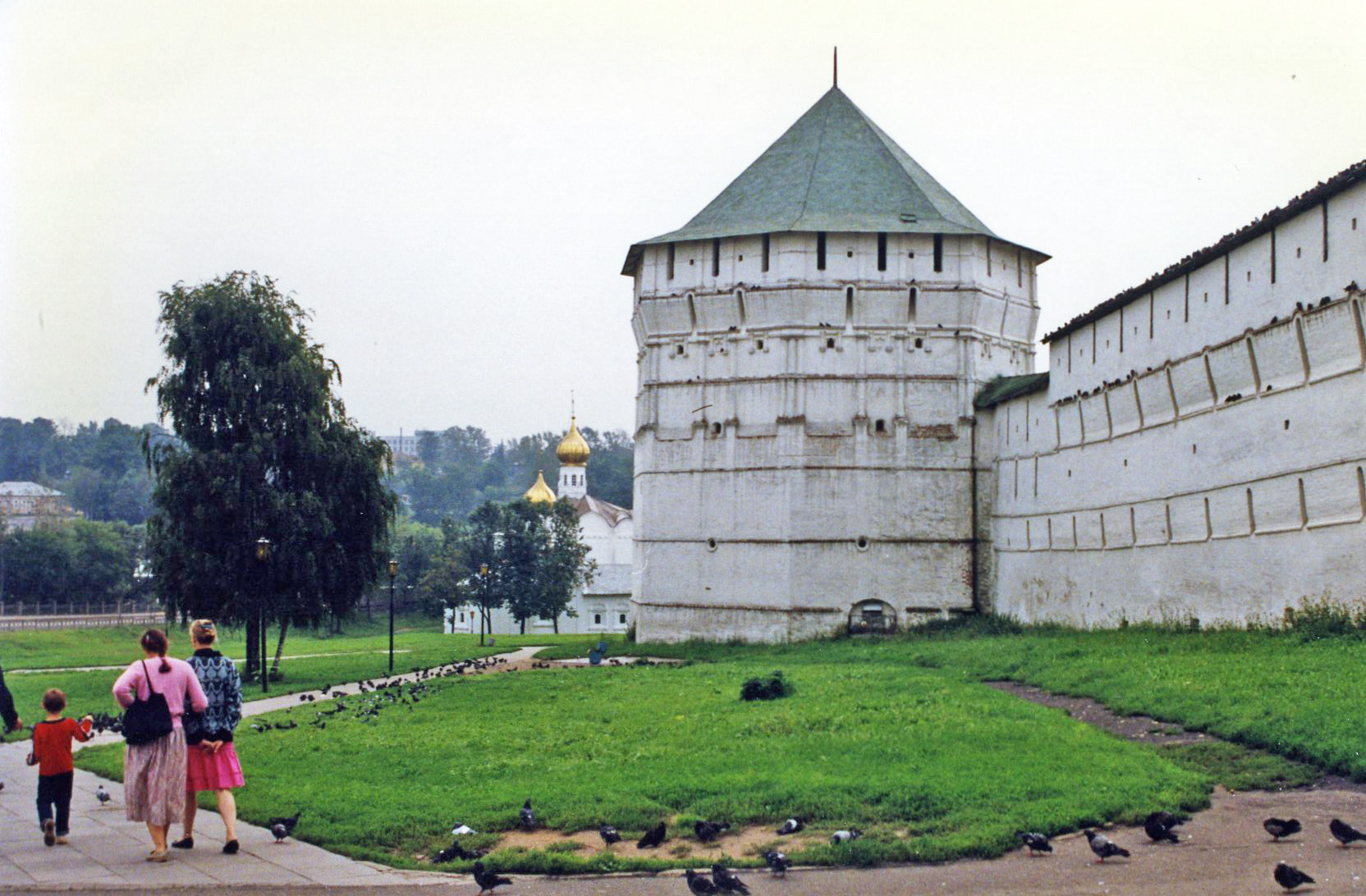 Sergeev Posad - Zagorsk - St. Sergius Monastery